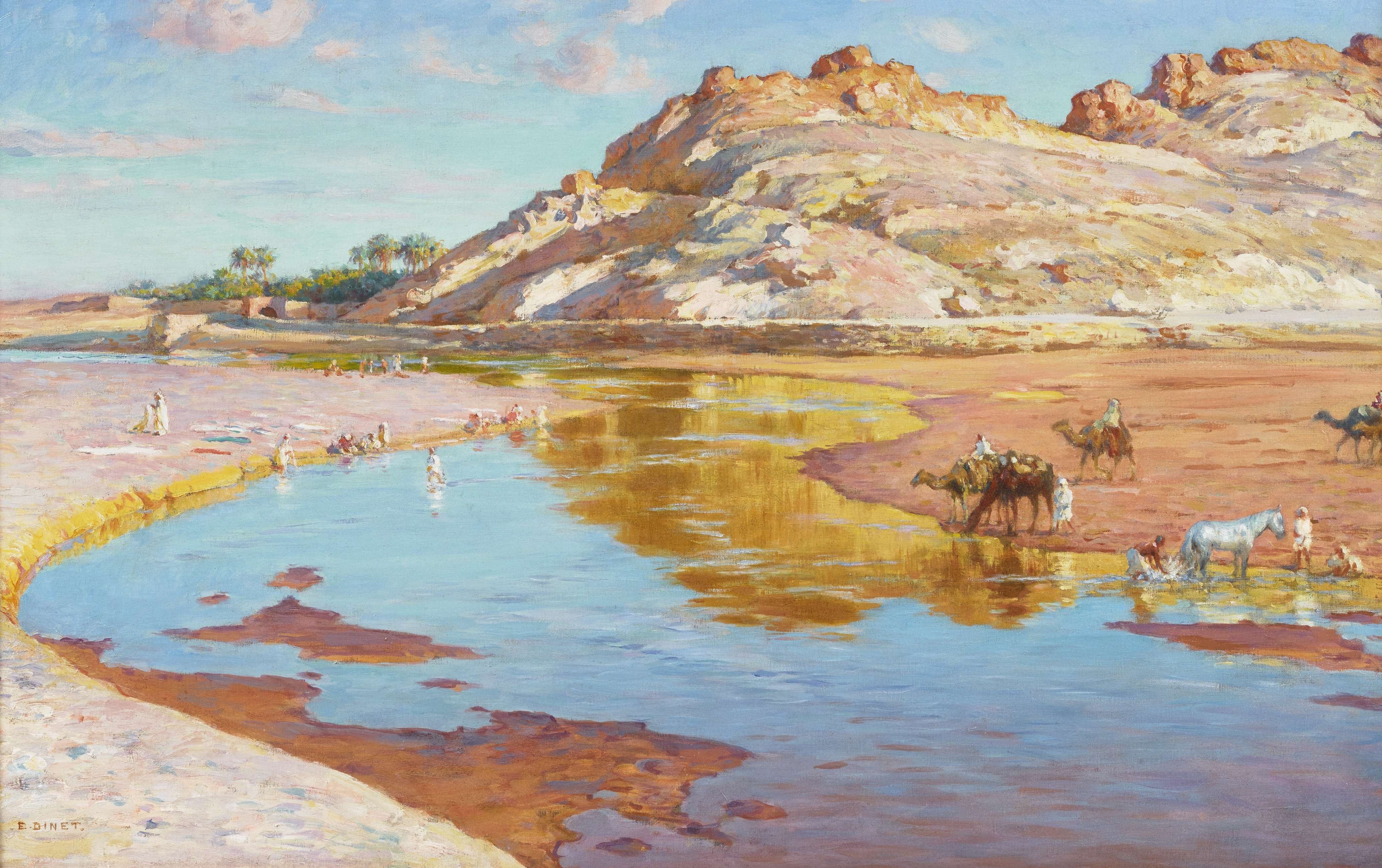 Une crue de lOued MZi